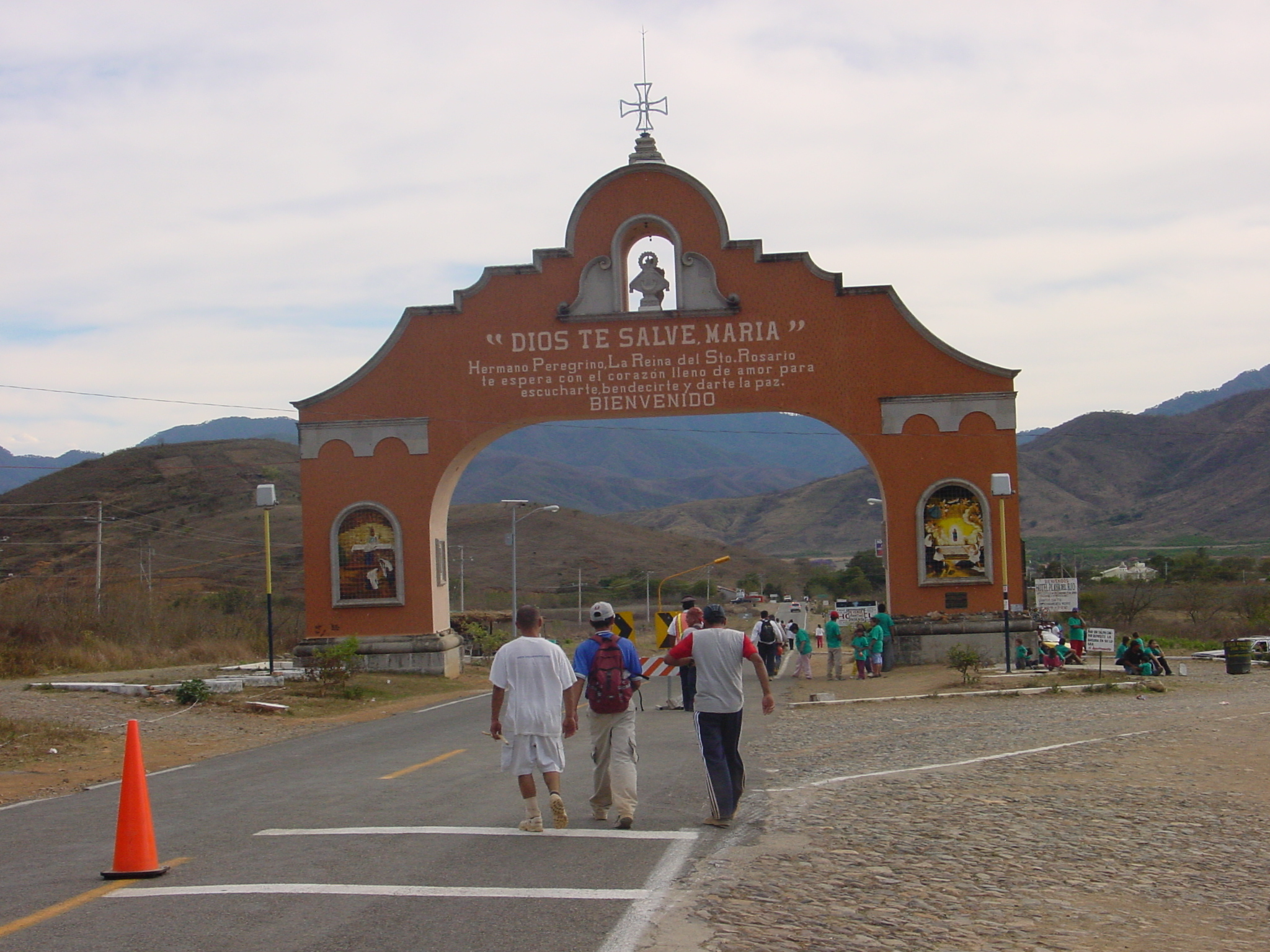 Peregrinos en Semana Santa en la entrada de bienvenida al pueblo de Talpa, Jalisco, México.